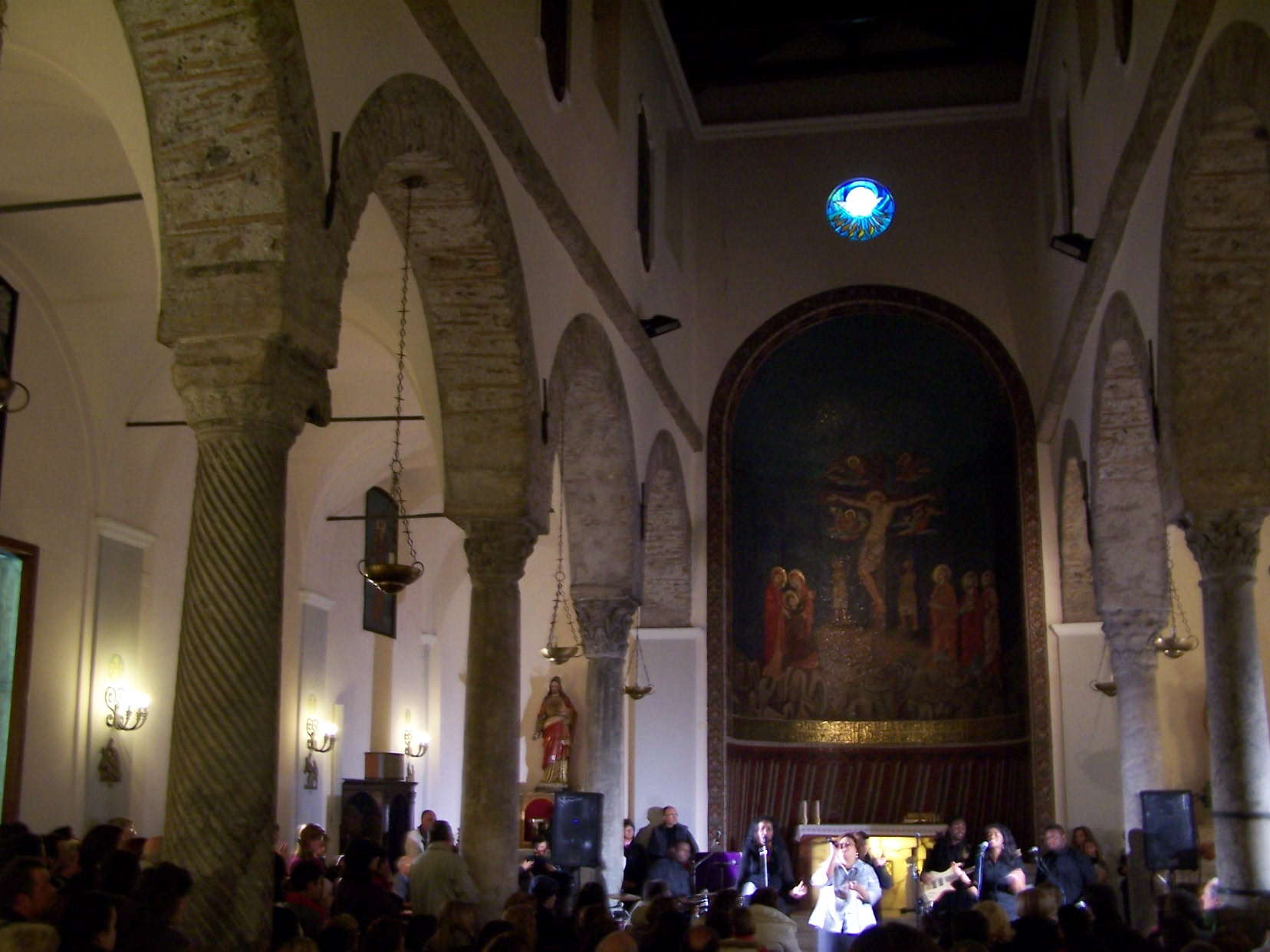 Interno della chiesa del SS. Crocifisso nel centro storico di Salerno.